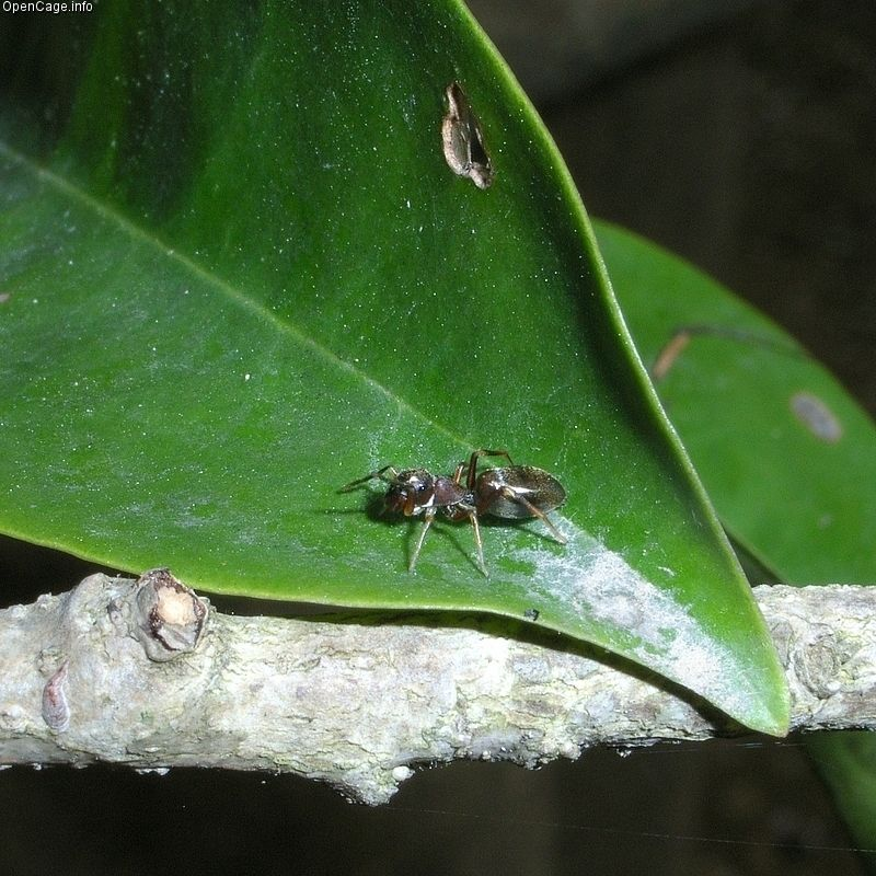 アリグモ Myrmarachne japonica antmimicking spider アリグモは蟻に擬態したハエトリグモの仲間。 Location 兵庫県加西市 県立フラワーセンター Copyright OpenCage